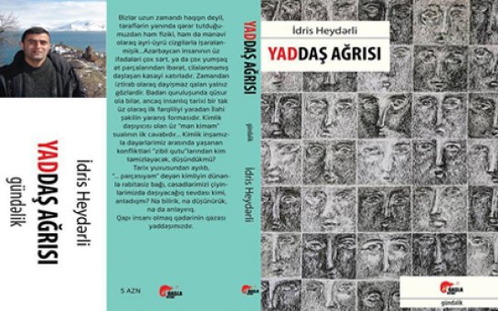 Yaddaş ağrısı kitabı